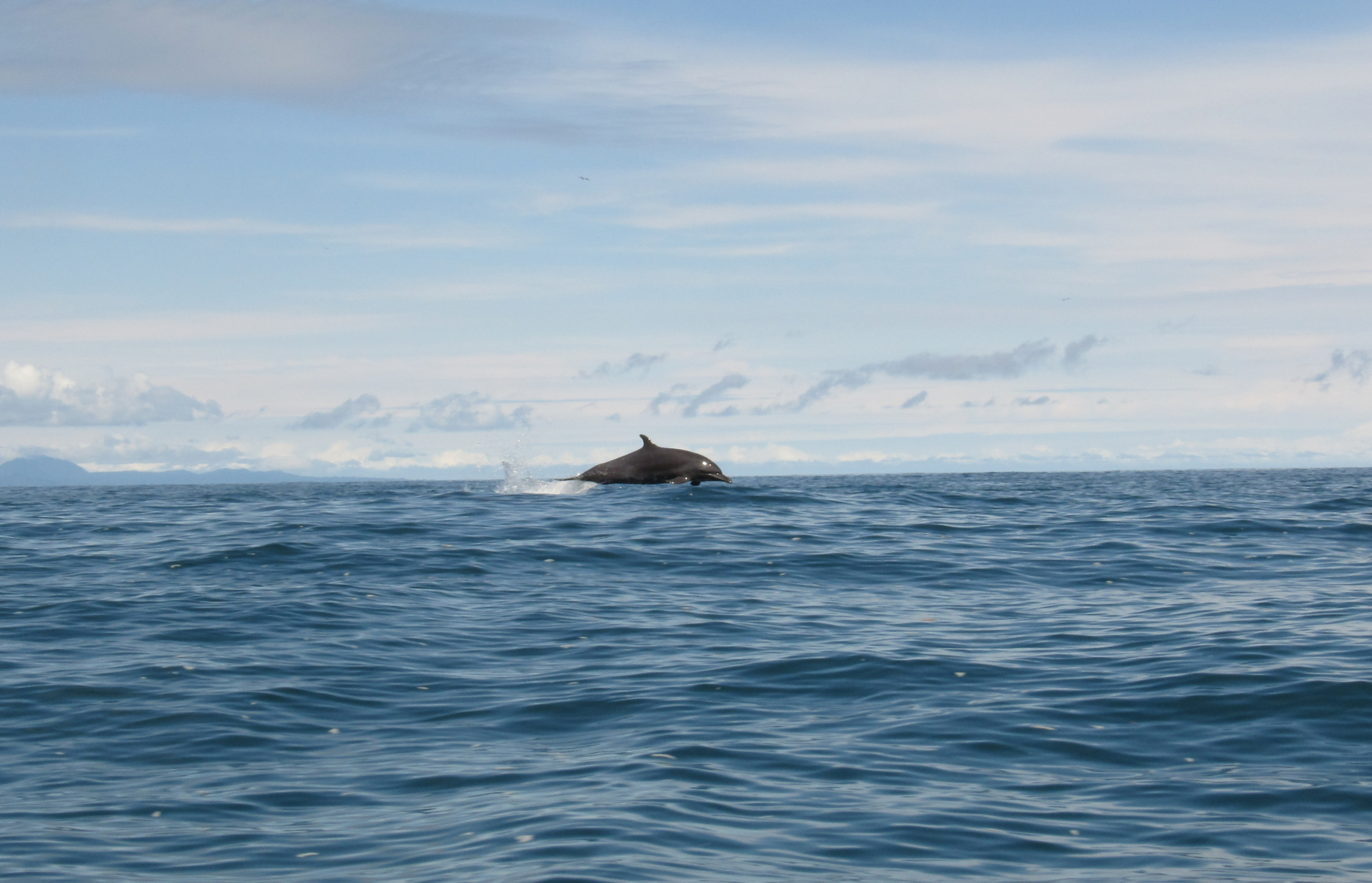 Pacífico Norte Chocoano